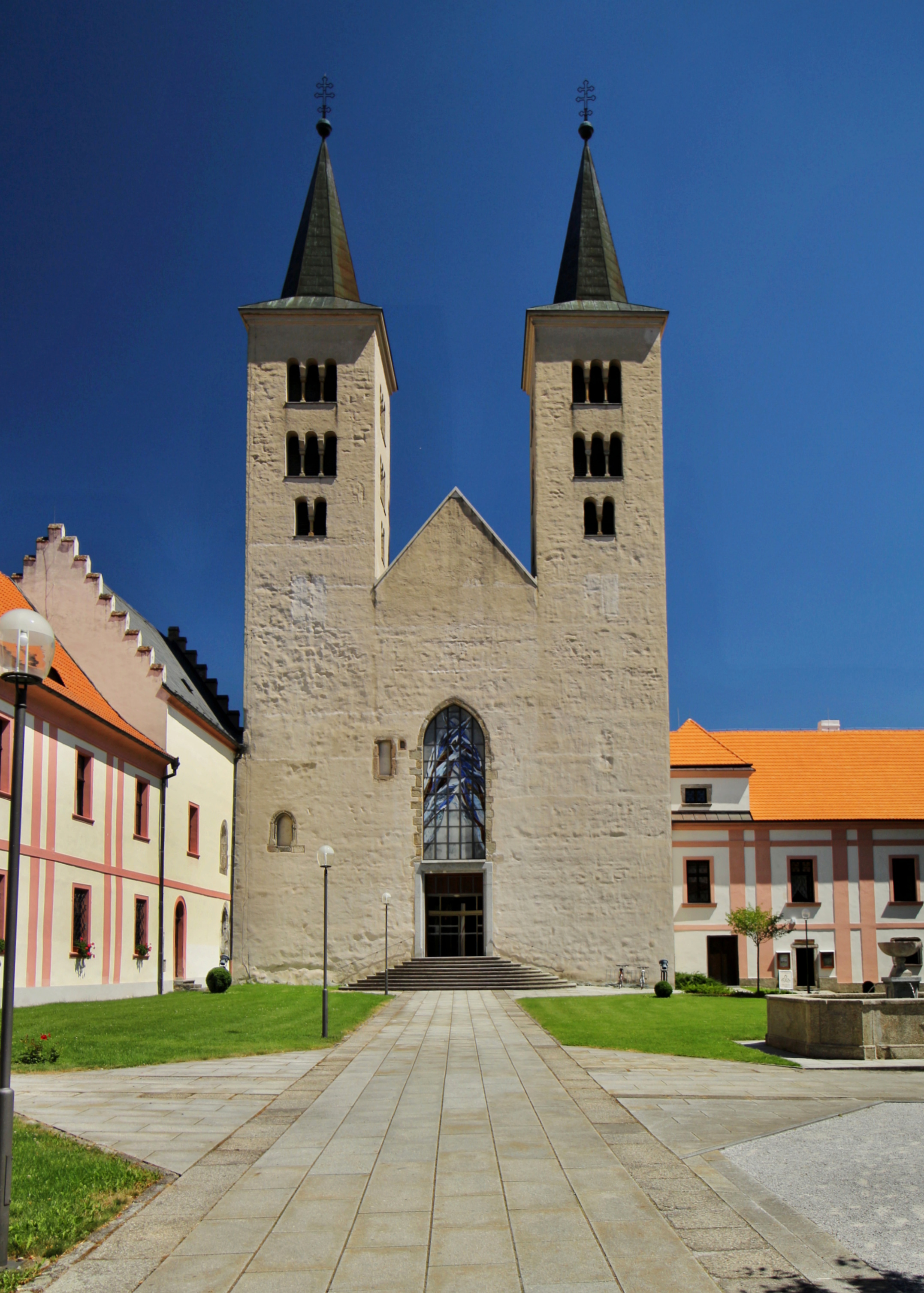 Klášterní bazilika Navštívení Panny Marie v Milevsku